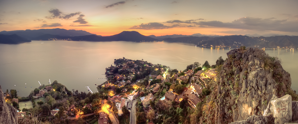 Panorámica en Valle de bravo